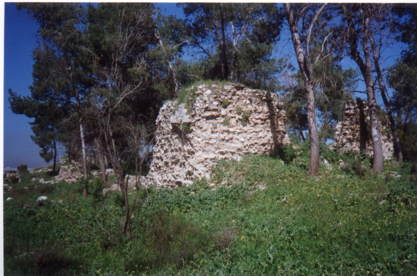 أحد المناظر في قرية قولة الفلسطينة